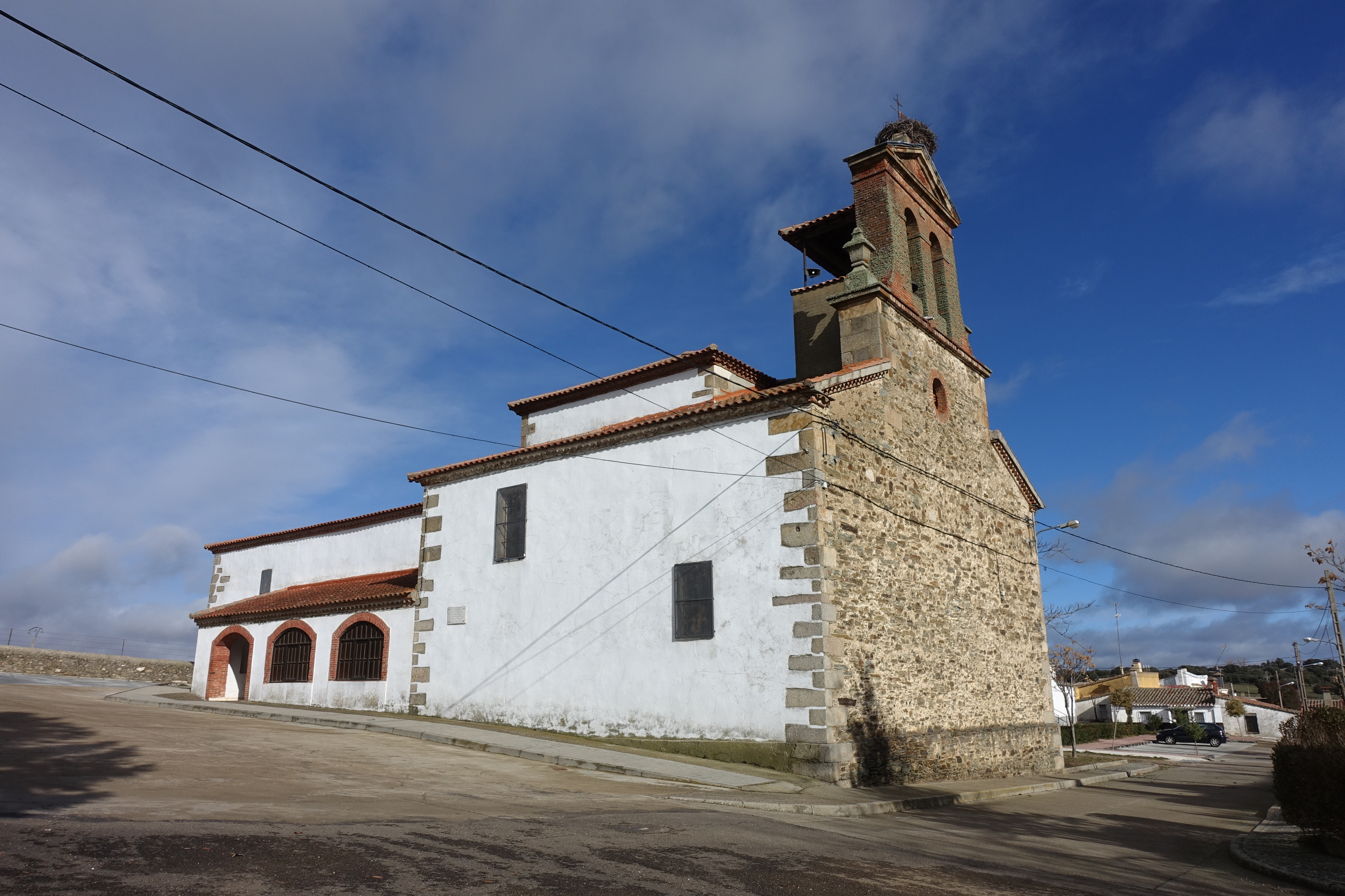 Iglesia de San Juan Bautista, Vecinos (Salamanca, España).